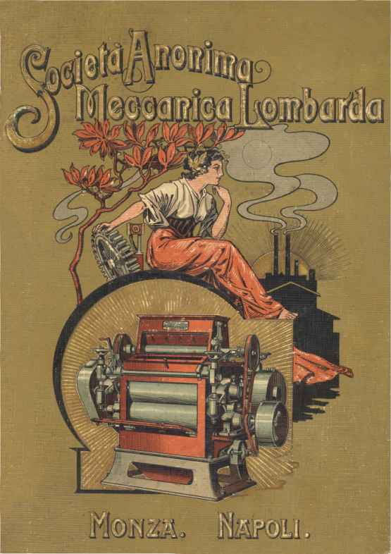 Catalogo della Società Anonima Meccanica Lombarda edito nel 1908